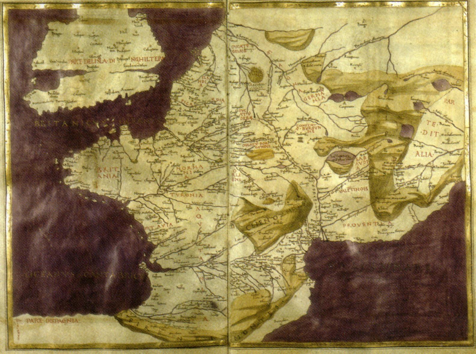 Carte moderne de France par Pietro del Massaio et Hugues Commineau, vers 1470-1480. Cosmographie de Ptolémée, Paris, Bibliothèque Nationale de France, latin 4802, fol. 125v-126.